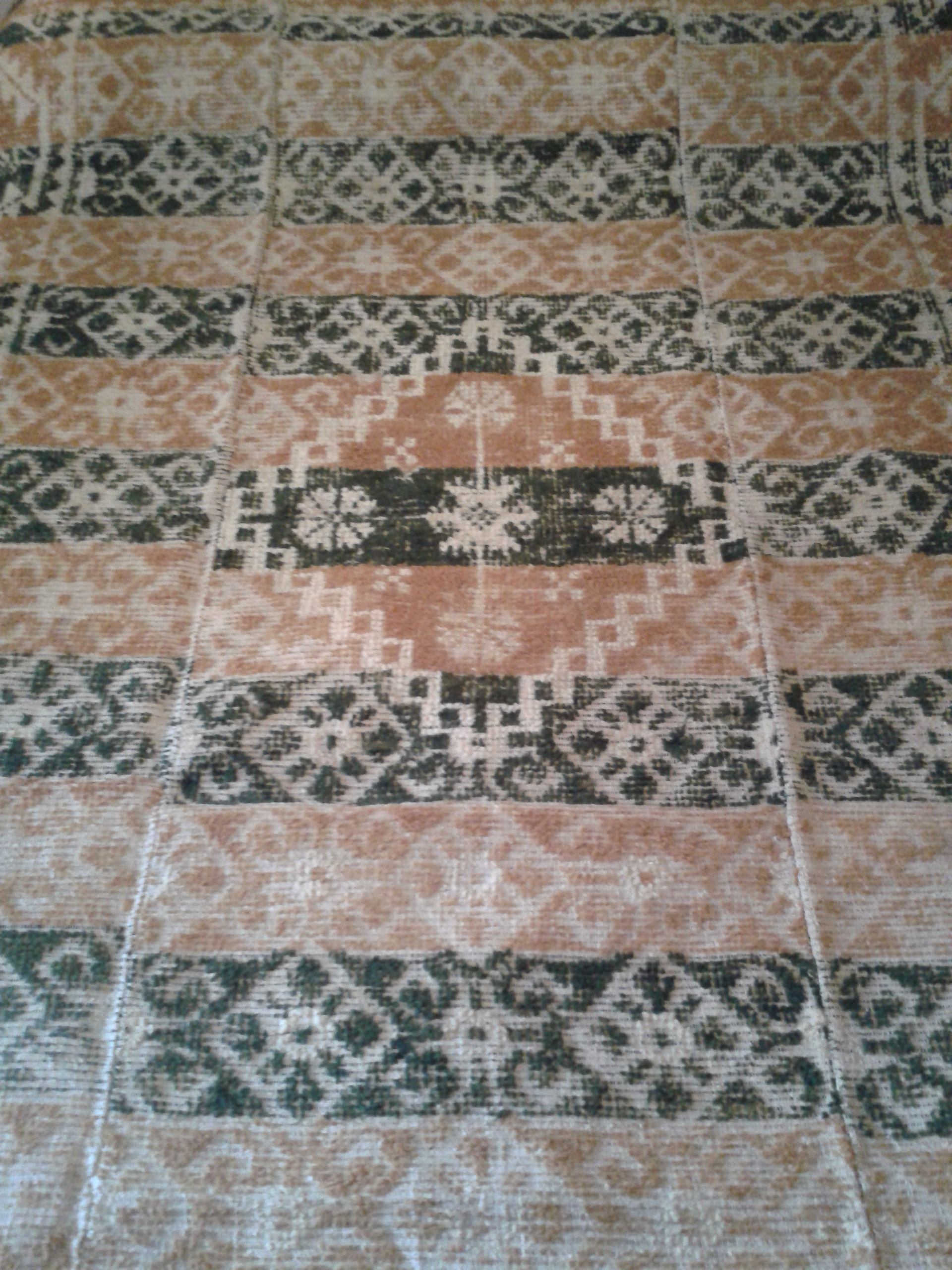 Alfombra española cuyo aspecto, trama y urdimbre presentan las del tipo Cuenca del S- XVII . Confeccionada en lana de colores blanca, amarilla y roja. Está realizada en telar mecánico en tres tiras de unos 50 cms de ancho cada una, (según la permitida por el telar) y cosidas entre sí hasta obtener las dimensiones totales de la alfombra. Decoración geométrica con cenefas de colores en bandas alternativas que incluyen redes de rombos. Colección particular.